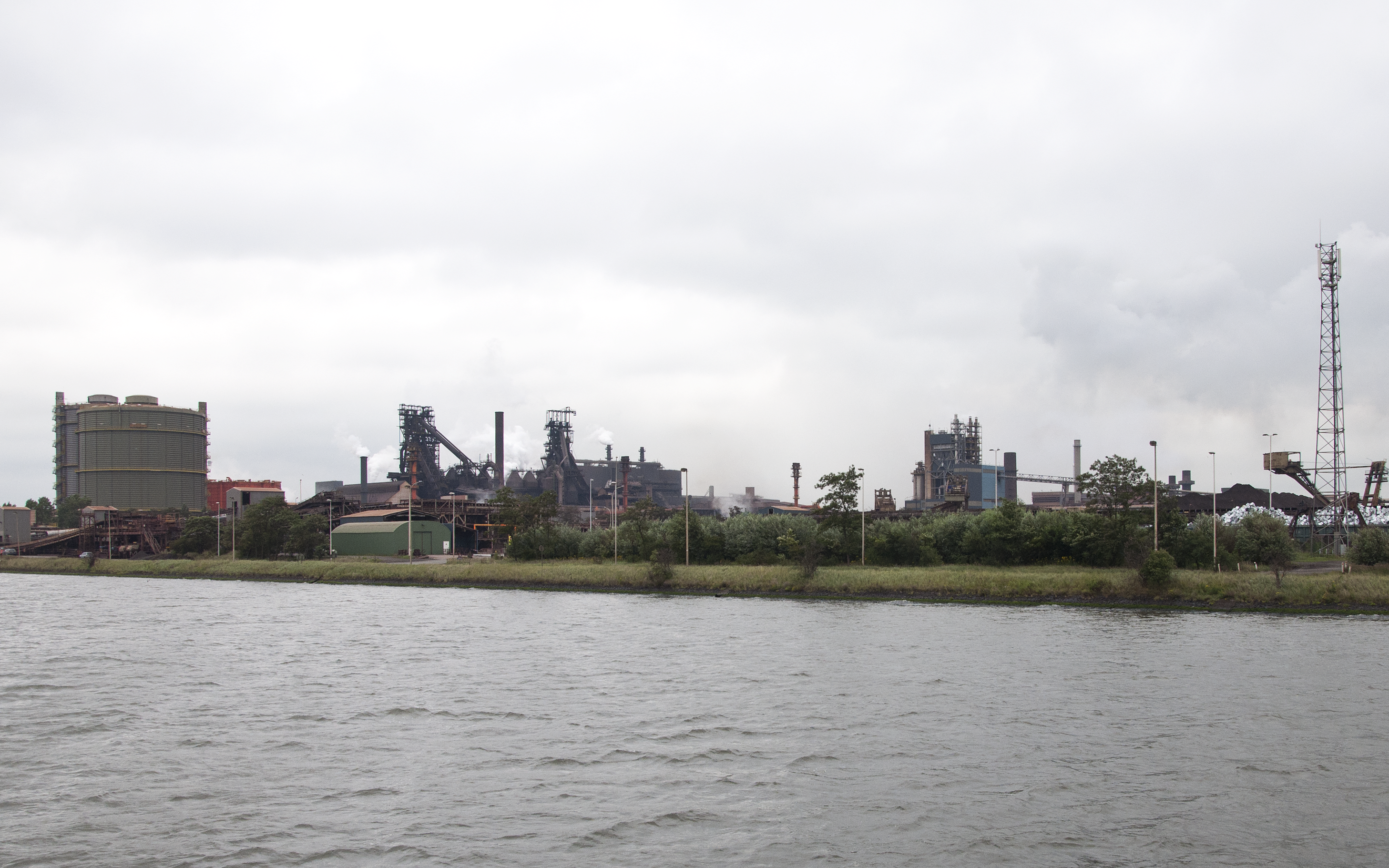 ArcelorMittal langs het kanaal-Gent-Terneuzen te Gent, België